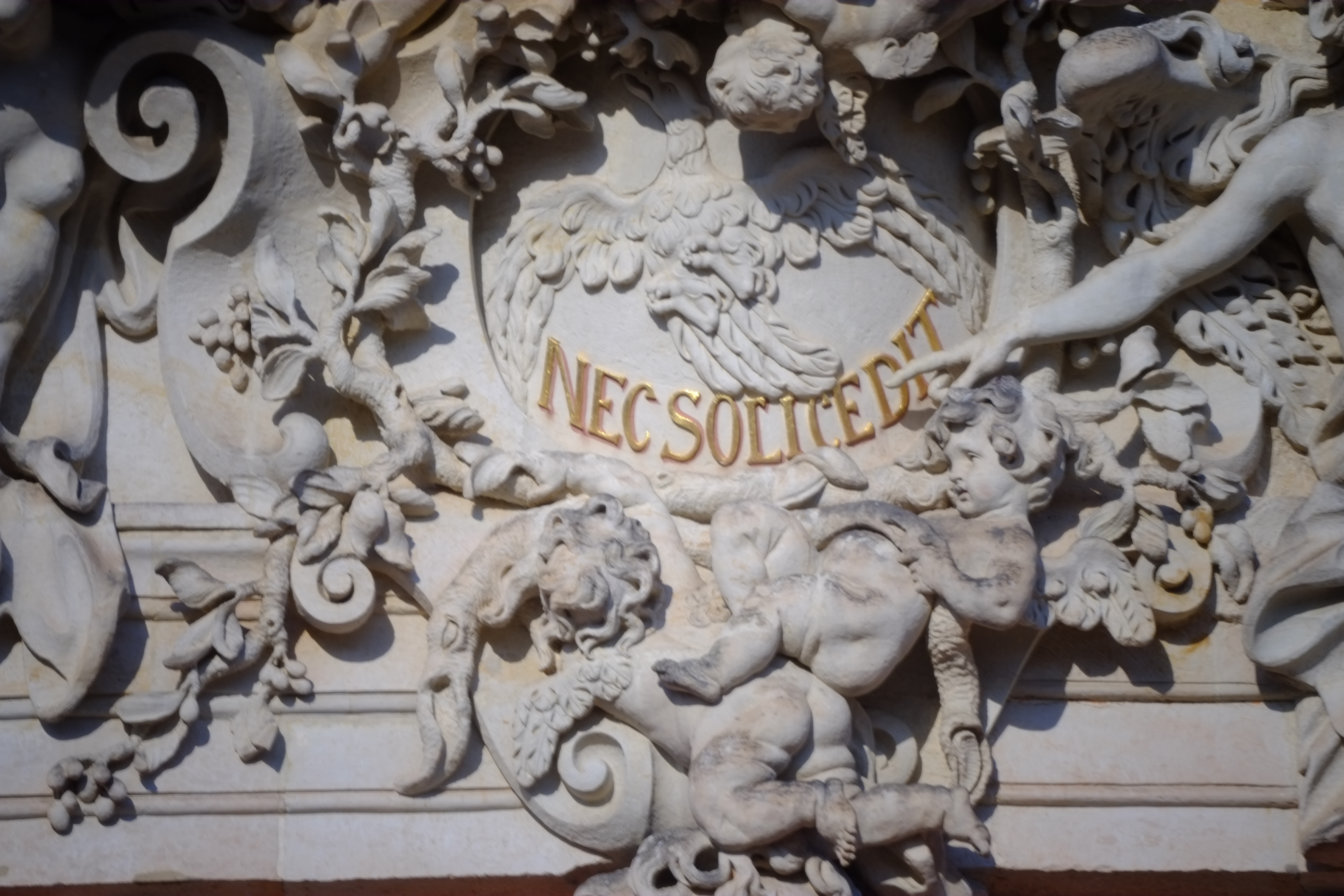 Auf dem Wappen des Neuen Palais in Potsdam